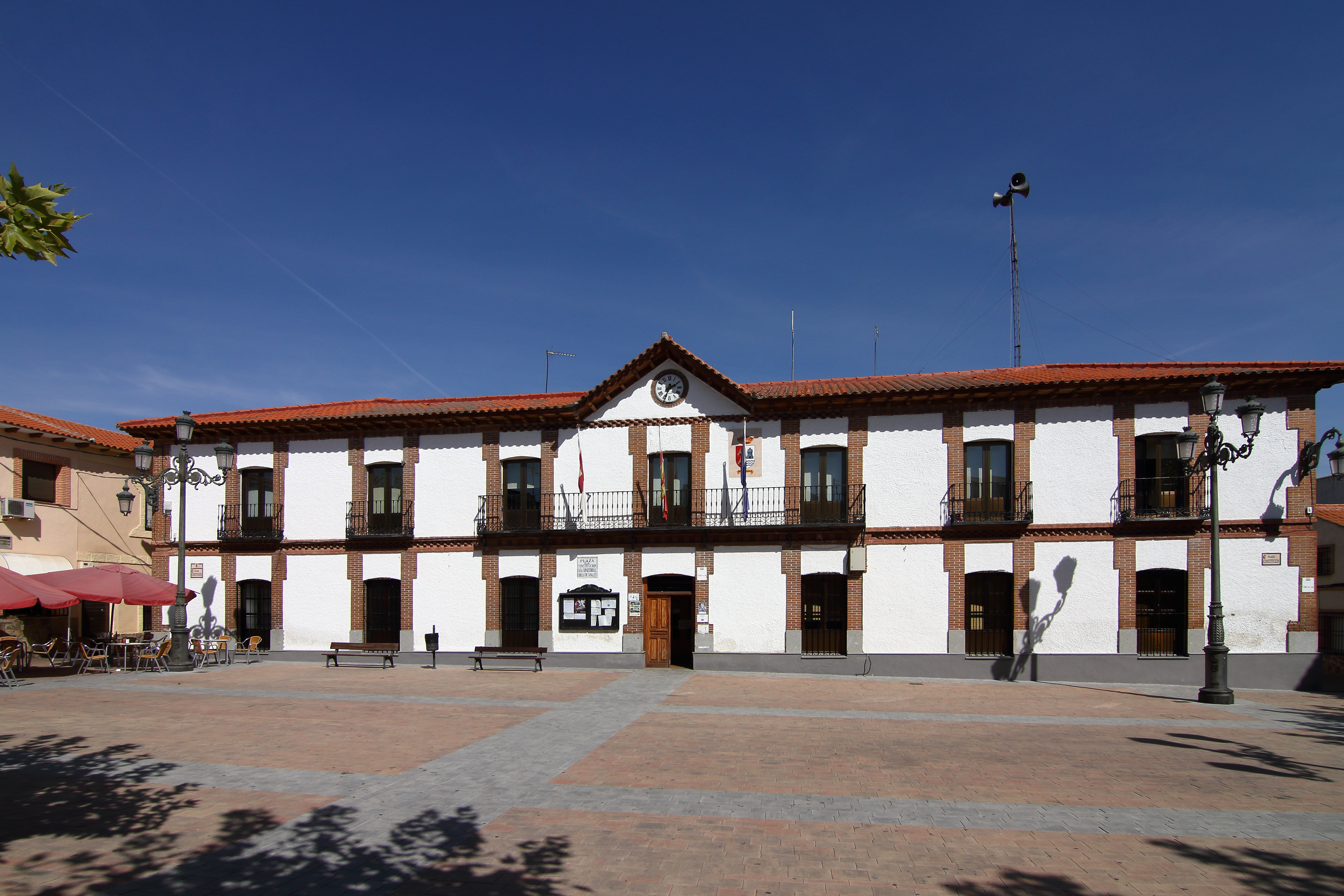 Ayuntamiento de Chozas de Canales